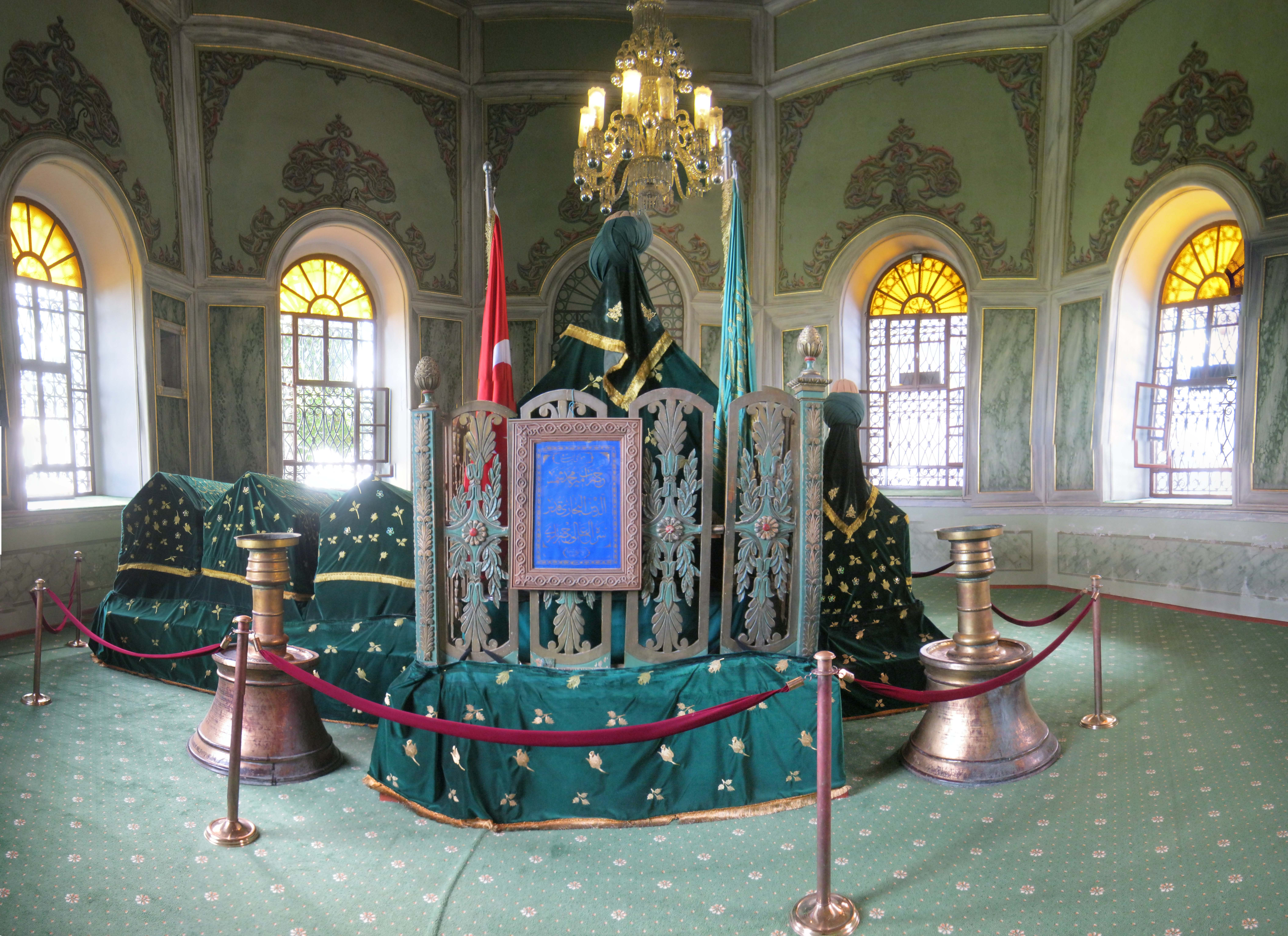 EMİRSULTAN HAZRETLERİNİN TÜRBESİ BURSA